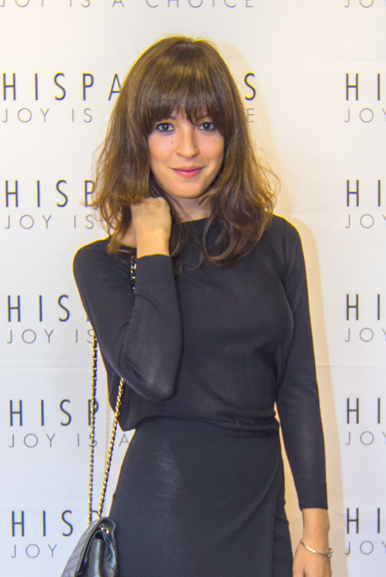 Verónica Sánchez en la inauguración de la tienda de Hispanitas en la calle Velázquez de Madrid (20 de octubre de 2016)